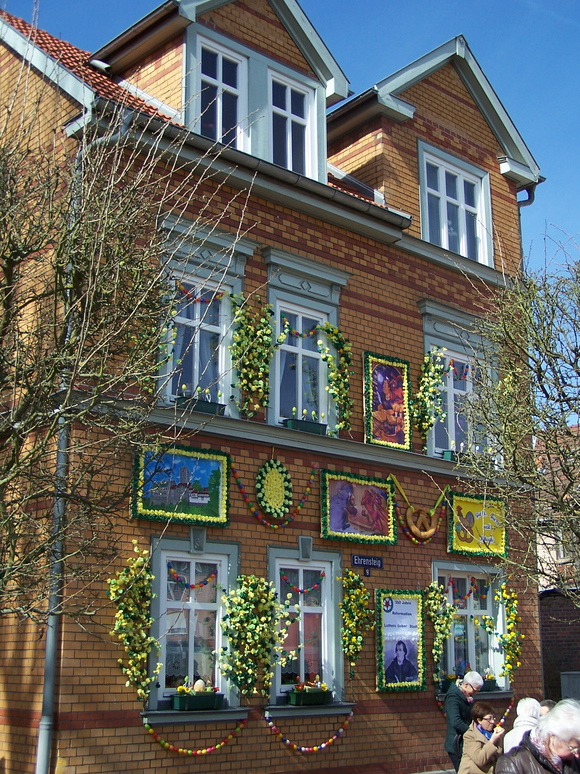 Impressionen vom Eisenacher Volksfest Sommergewinn am 25. März 2017. Am Ehrensteig.